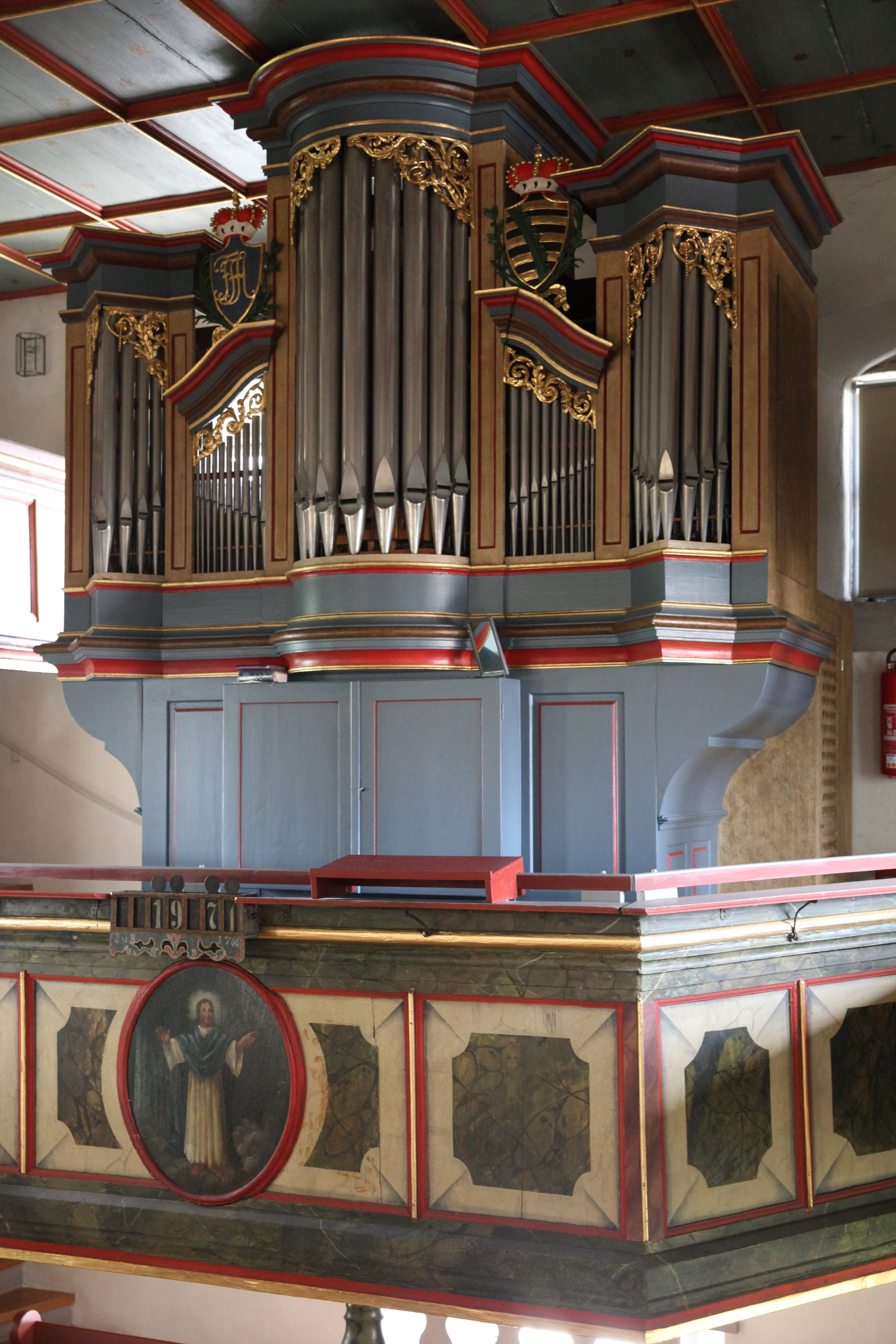 Orgel, Evangelische Pfarrkirche in Scherneck